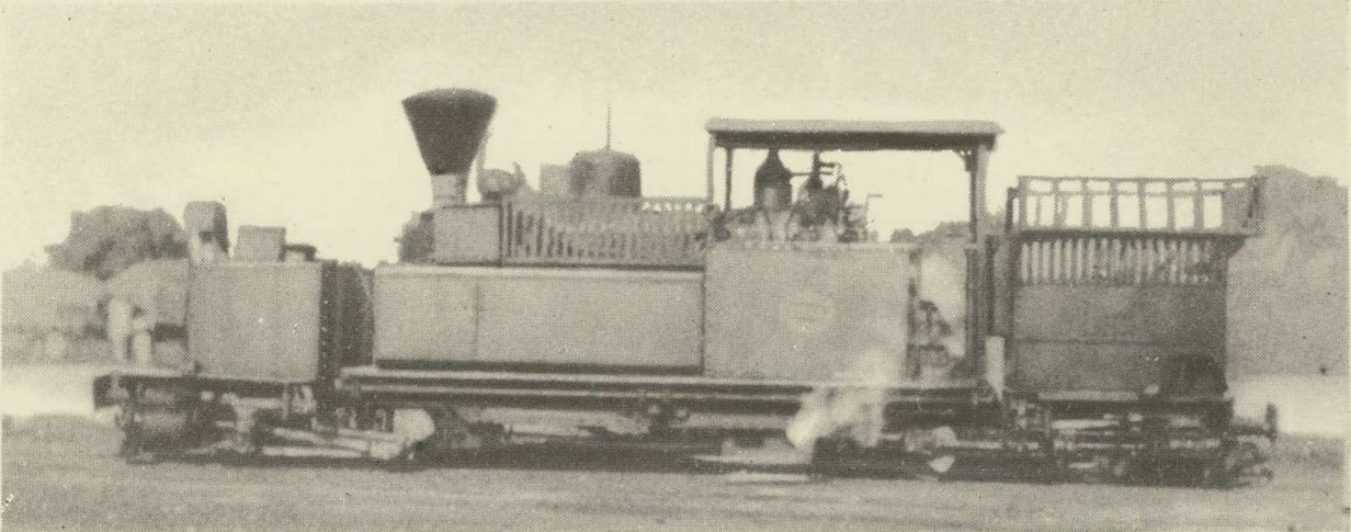 Locomotive Garrat de Chemins de fer du Mayumbe